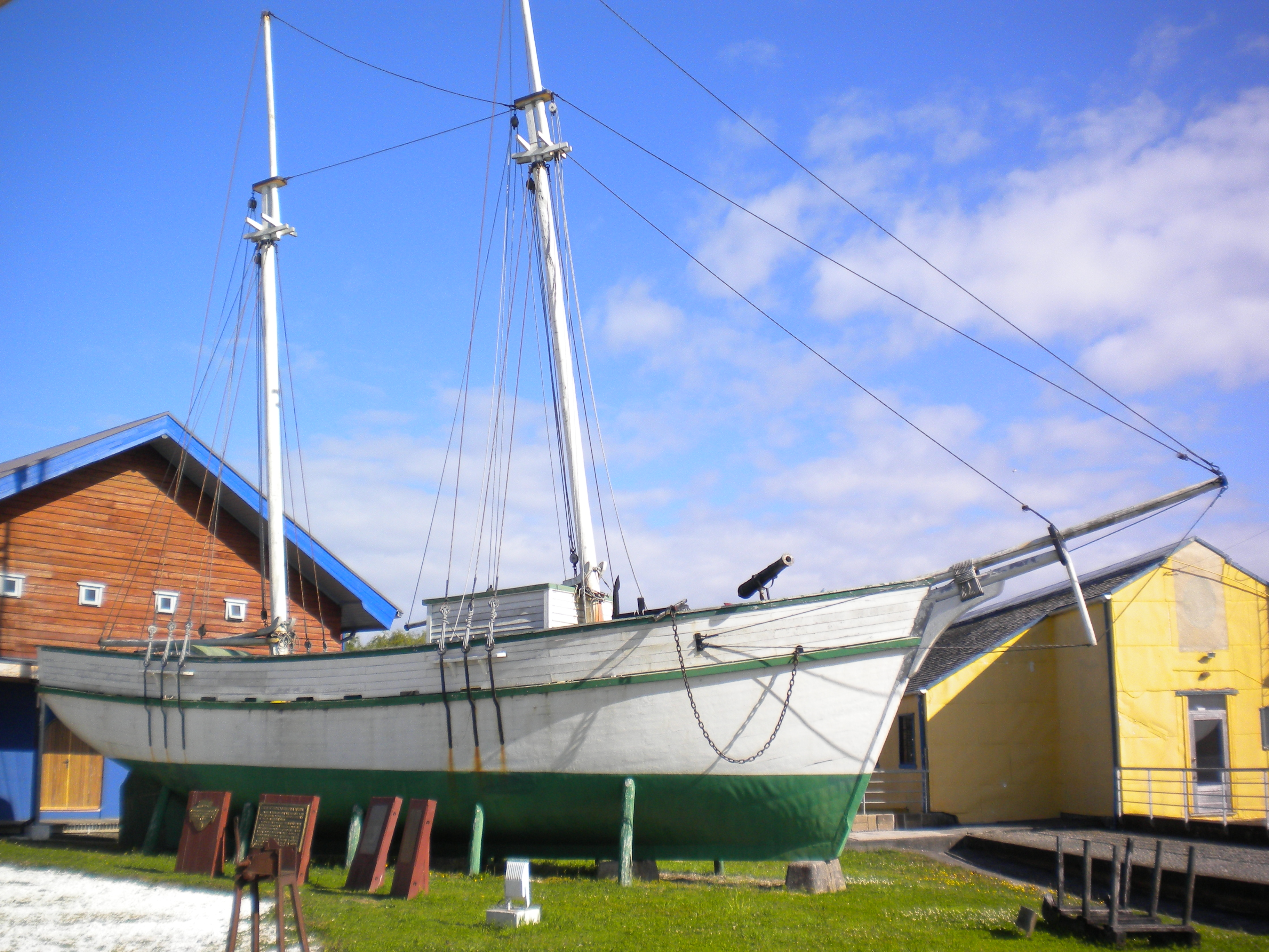 Goleta en Museo Ancud